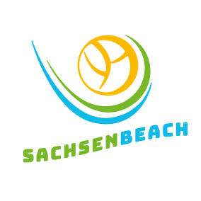 SachsenBeach Logo ab 2017